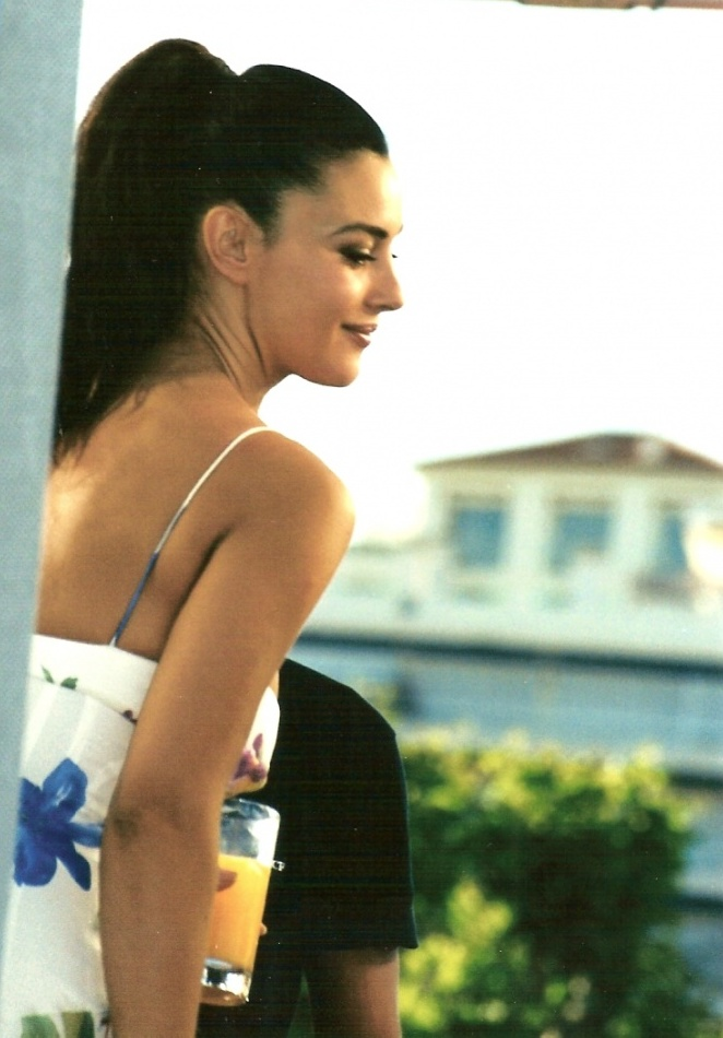 Monica Bellucci